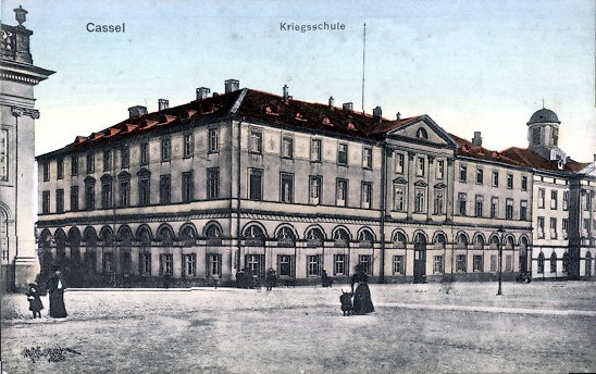 Kriegsschule in Kassel, 1826-1829 als Hofverwaltungsgebäude errichtet, ab 1867 Kriegsschule, 1943 ausgebrannt, 1954 gesprengt; rechts am Bildrand die Elisabethkirche, erbaut 1770-1777